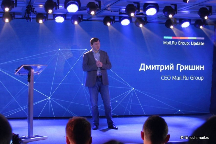 Дмитрий Гришин на конференции Mail.Ru Group Update, 2012 год